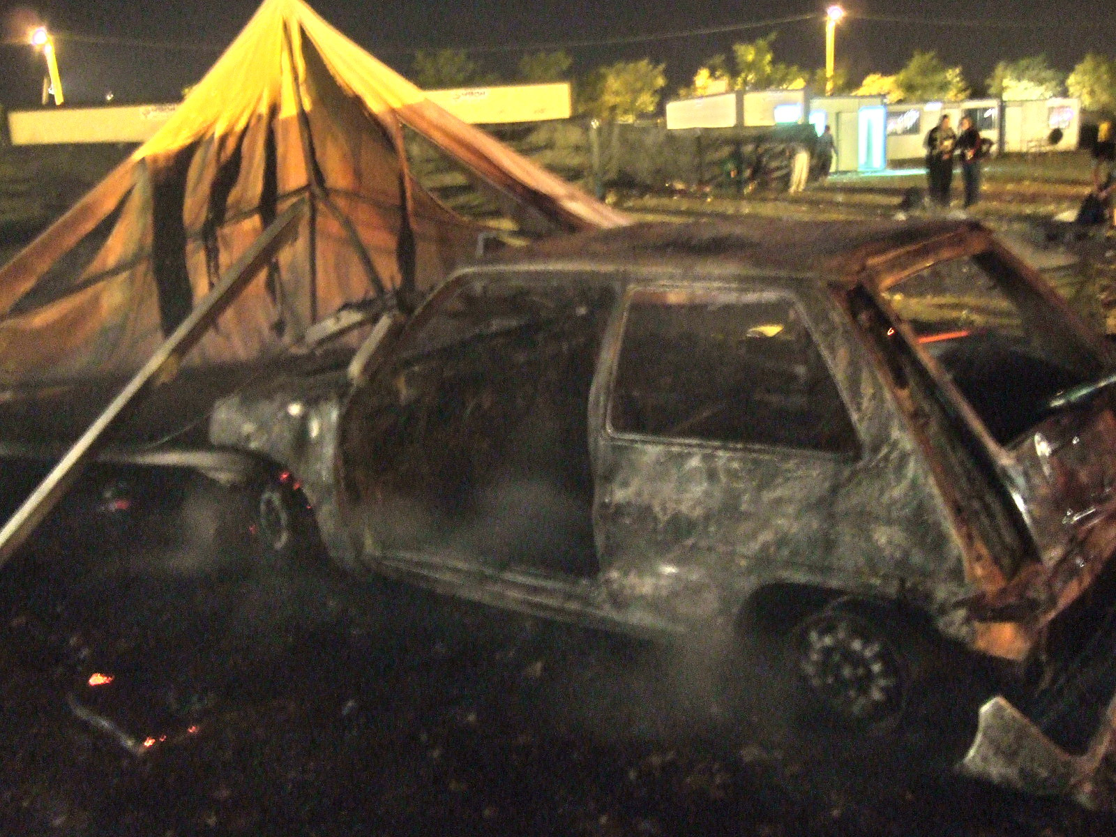 Destrozos en Festimad 2005; uno de los coches que promocionaba el nuevo modelo de Toyota, quemado.